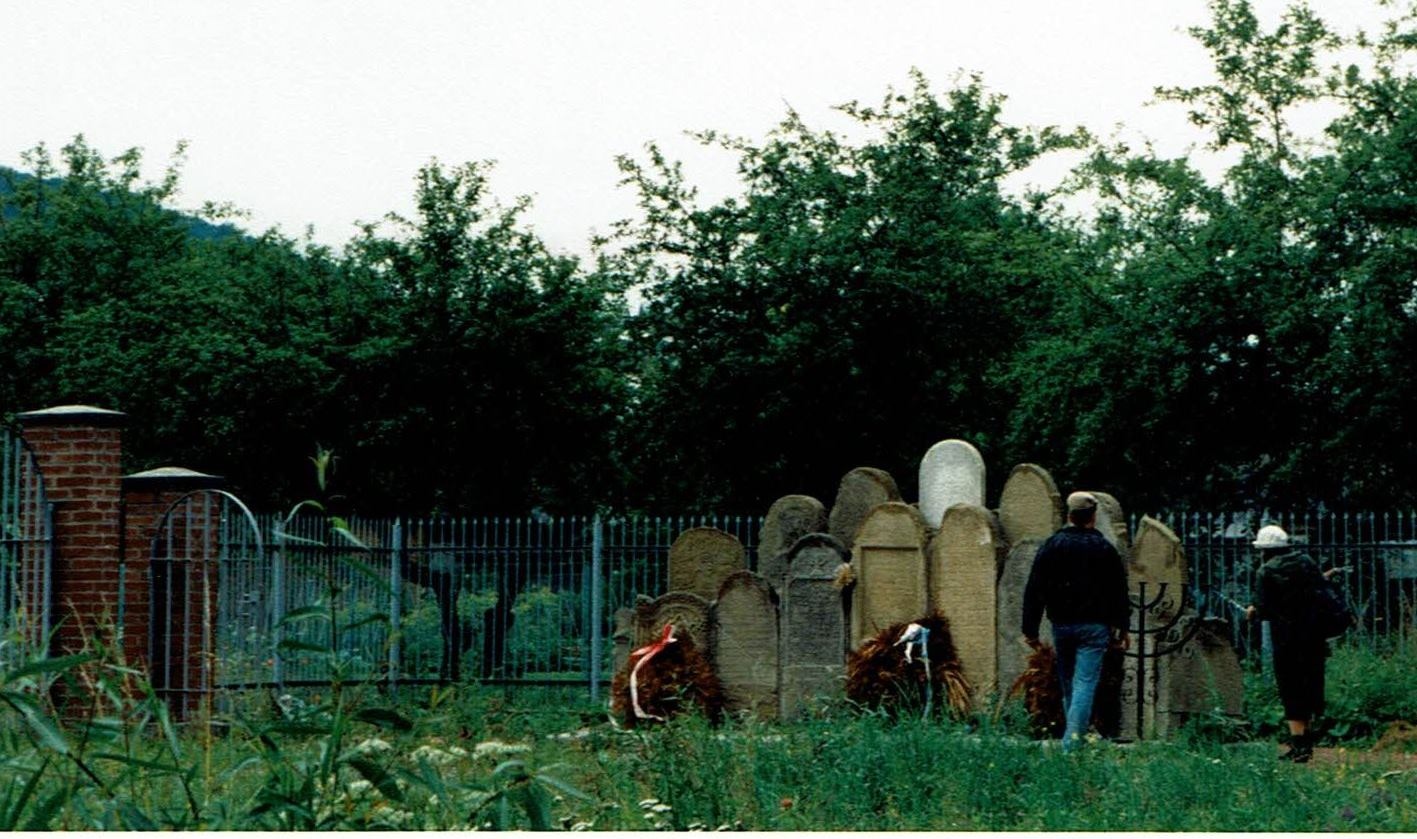 בית הקברות היהודי בגורליצה, 1996